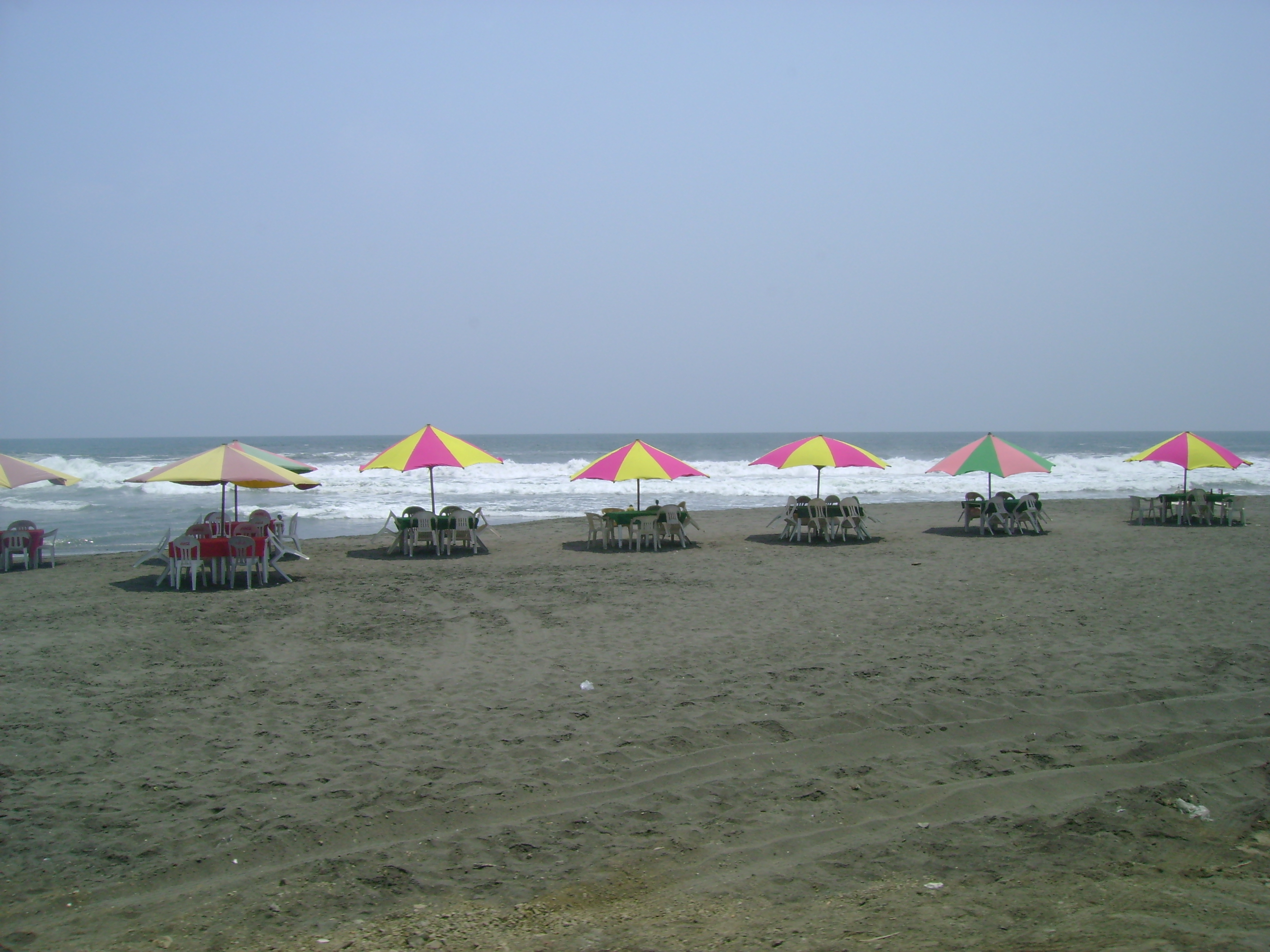 Playa Boca de Pascuales.